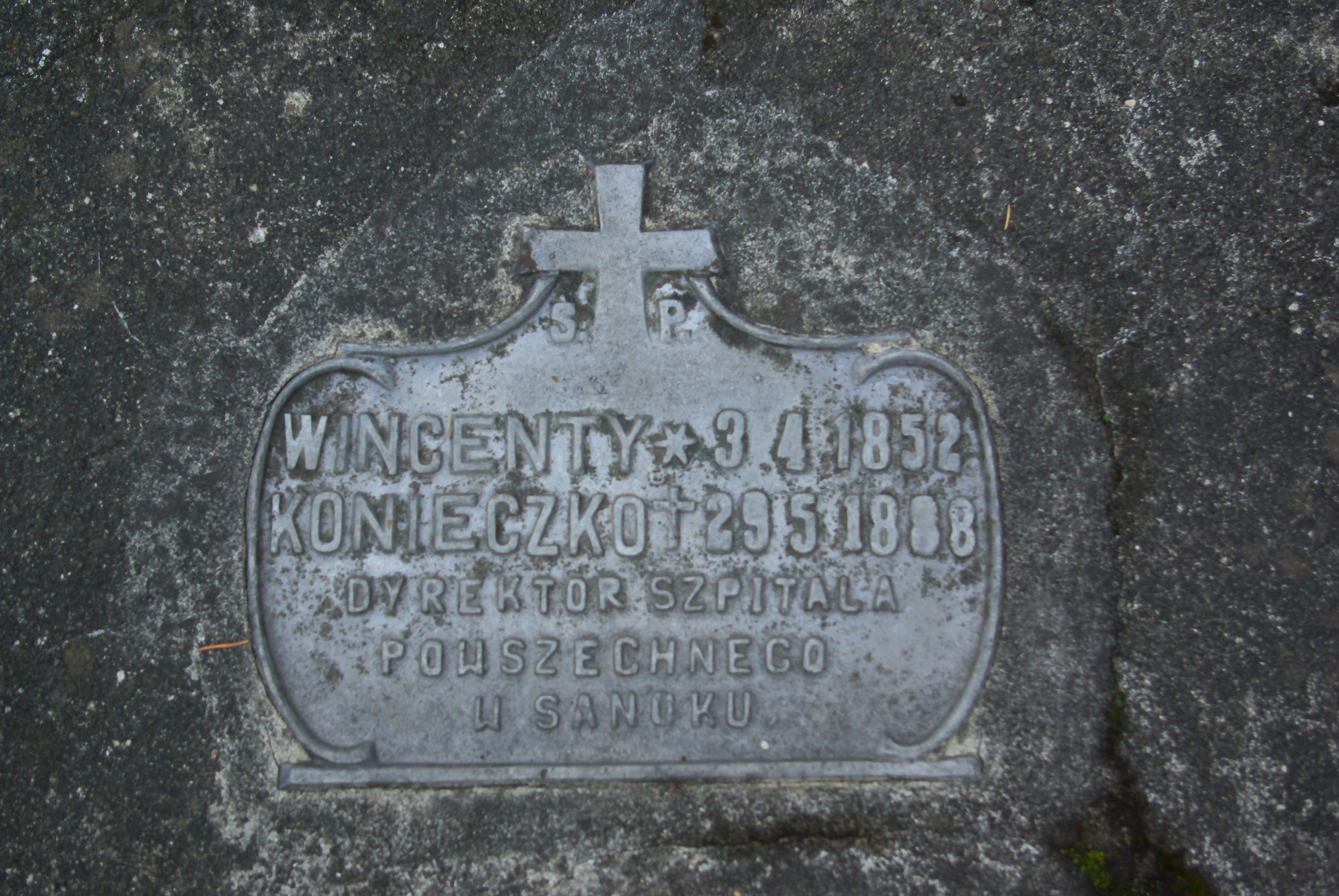 Grobowiec rodziny Konieczków w części „Matejki Stary” Cmentarza Centralnego w Sanoku